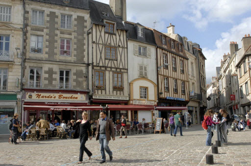 La place du Marché Notre-Dame et son héritage médiéval